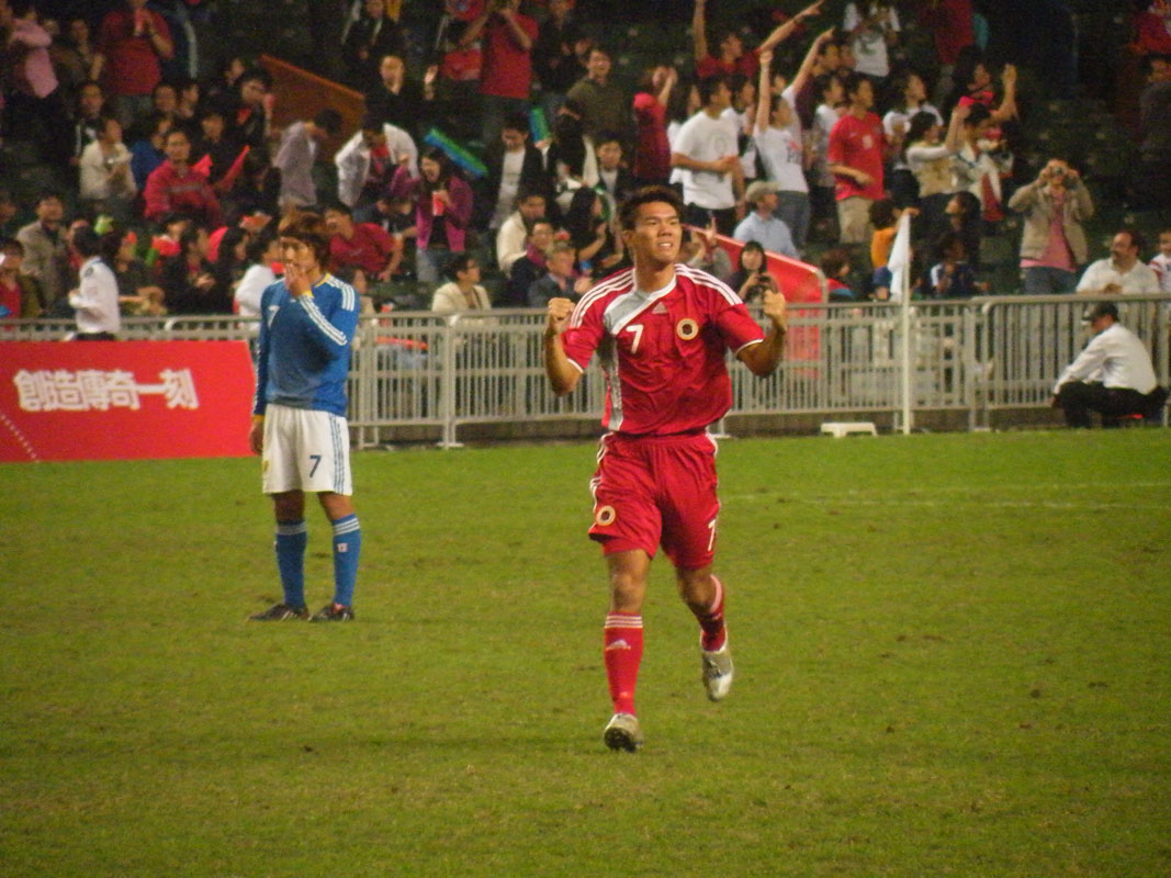 2009 East Asian Games Football Final Match - Hong Kong, China vs Japan at Hong Kong Stadium on 2009.12.12. Chan Siu Ki (陳肇麒)